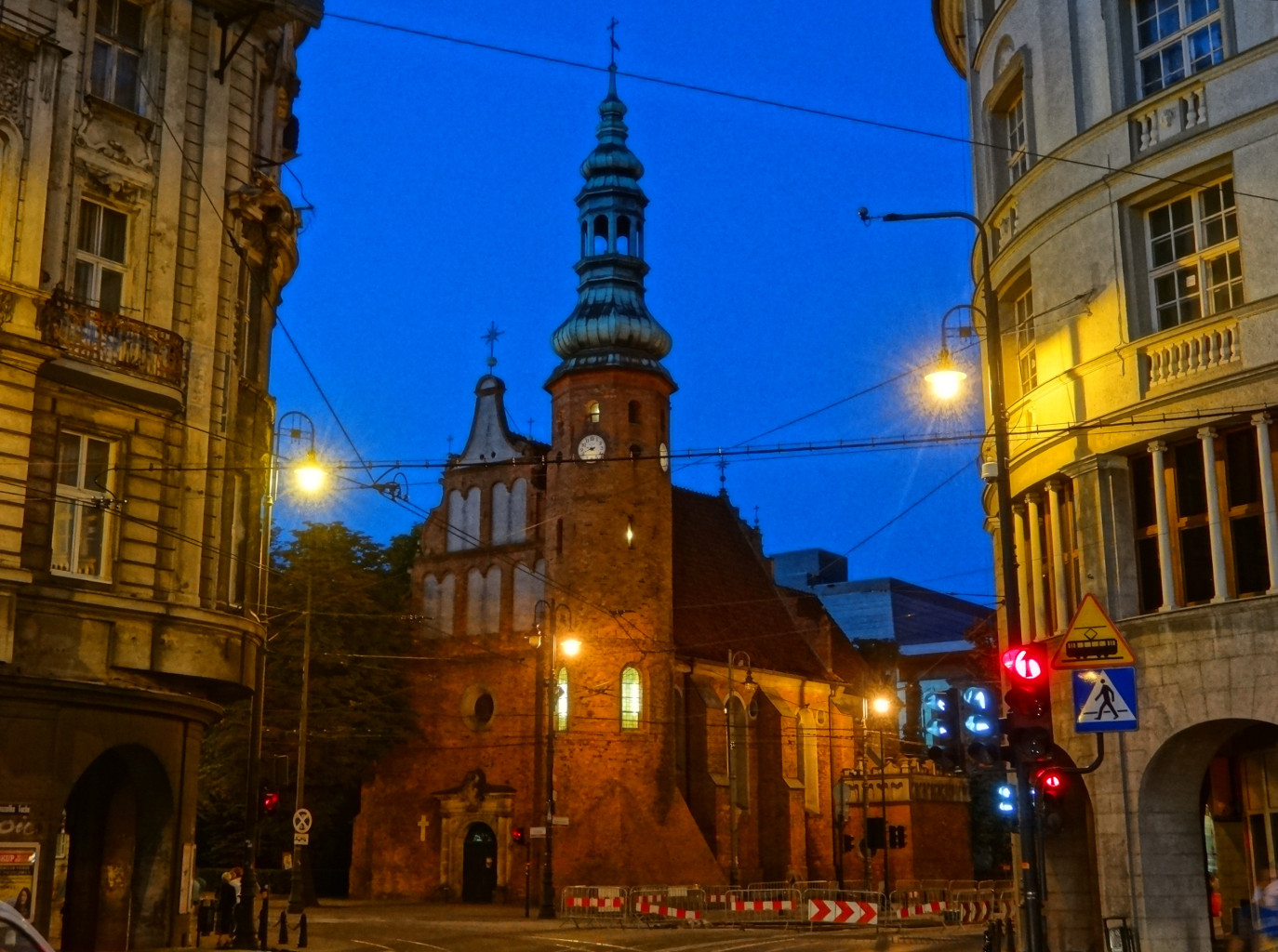 Kościół p.w. Wniebowzięcia Najświętszej Marii Panny w Bydgoszczy (zbud. 1582-1615, do 1835 r. kościół klasztorny klarysek bydgoskich)